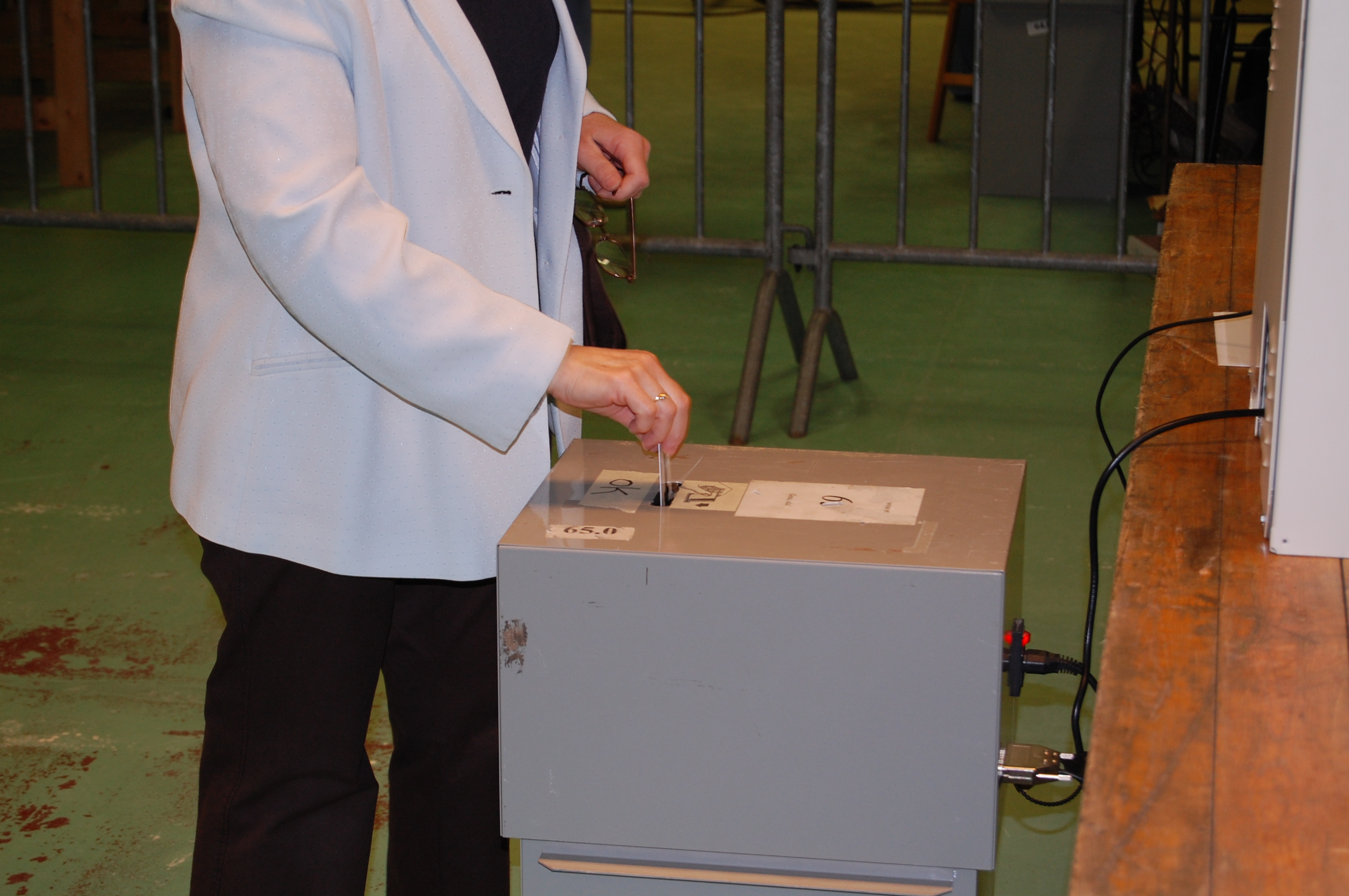 2007 federal elections in Belgium. Picture take in election bureau 65 in Wilsele, Leuven, Vlaams-Brabant, Belgium.